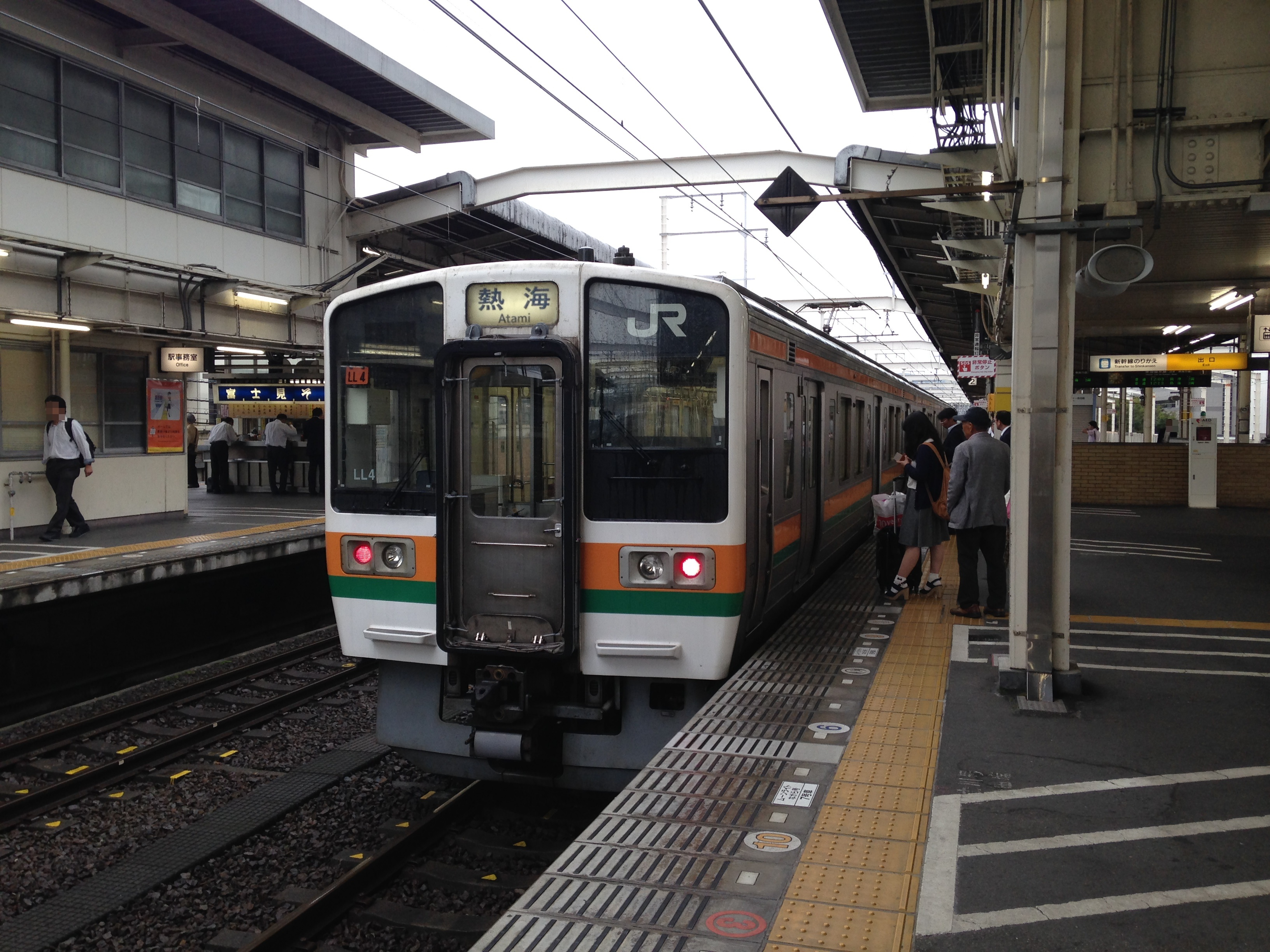 静岡駅のホームと熱海行き普通列車